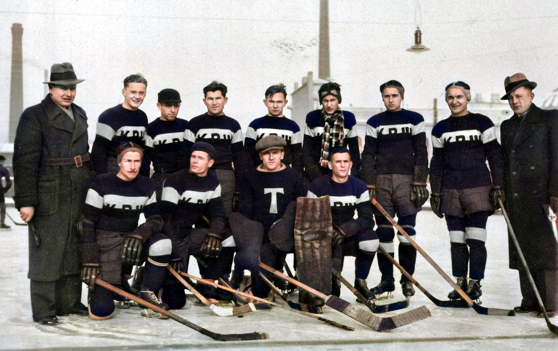 Drużyna hokejowa Kolejowego Przysposobienia Wojskowego Pomorzanin Toruń w roku 1938